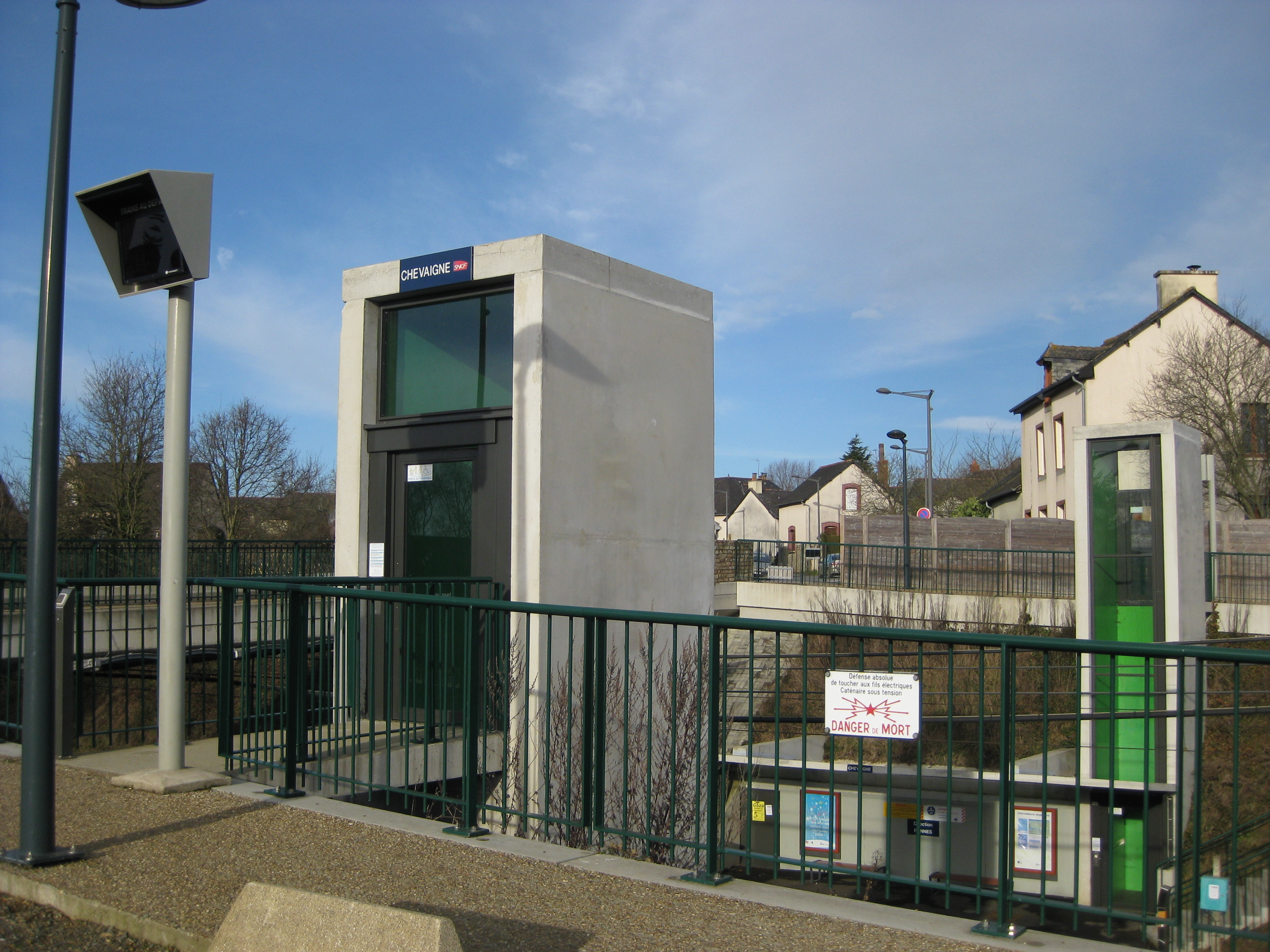 Gare SNCF de Chevaigné